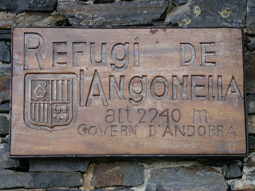 Placa indicadora del refugi de l'Angonella